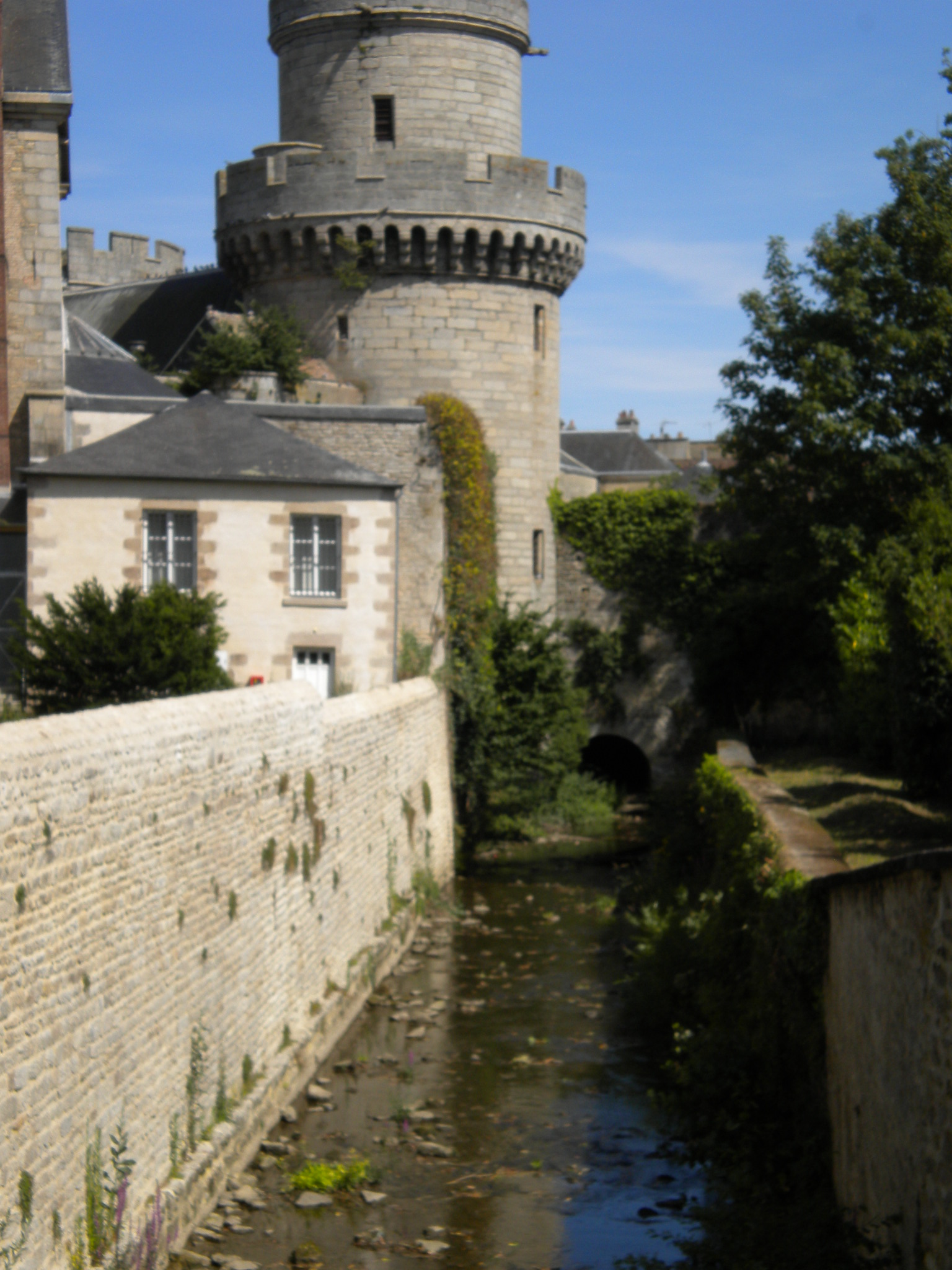 Alençon, la Sarthe vue d'un pont